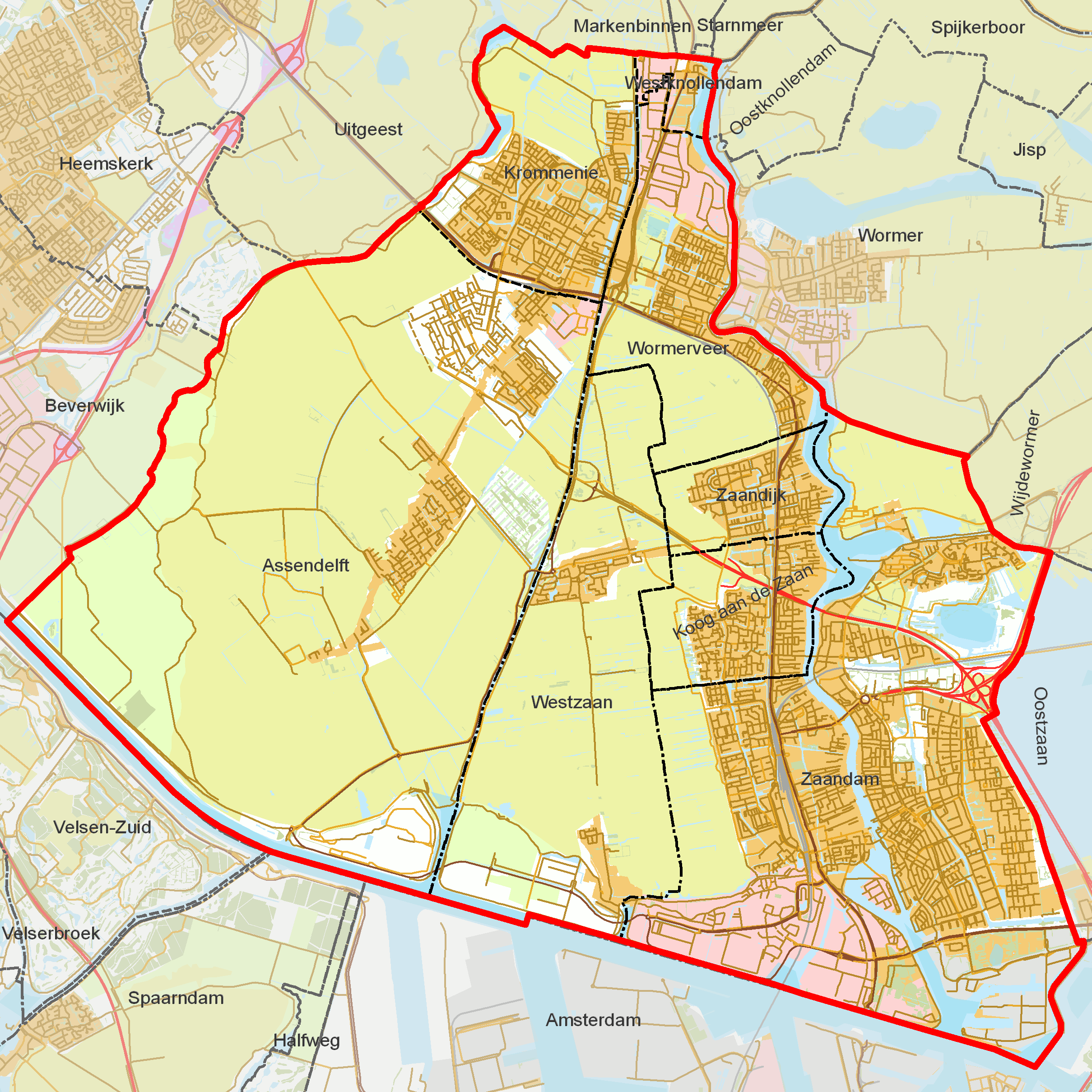 BAG woonplaatsen - Gemeente Zaanstad.png